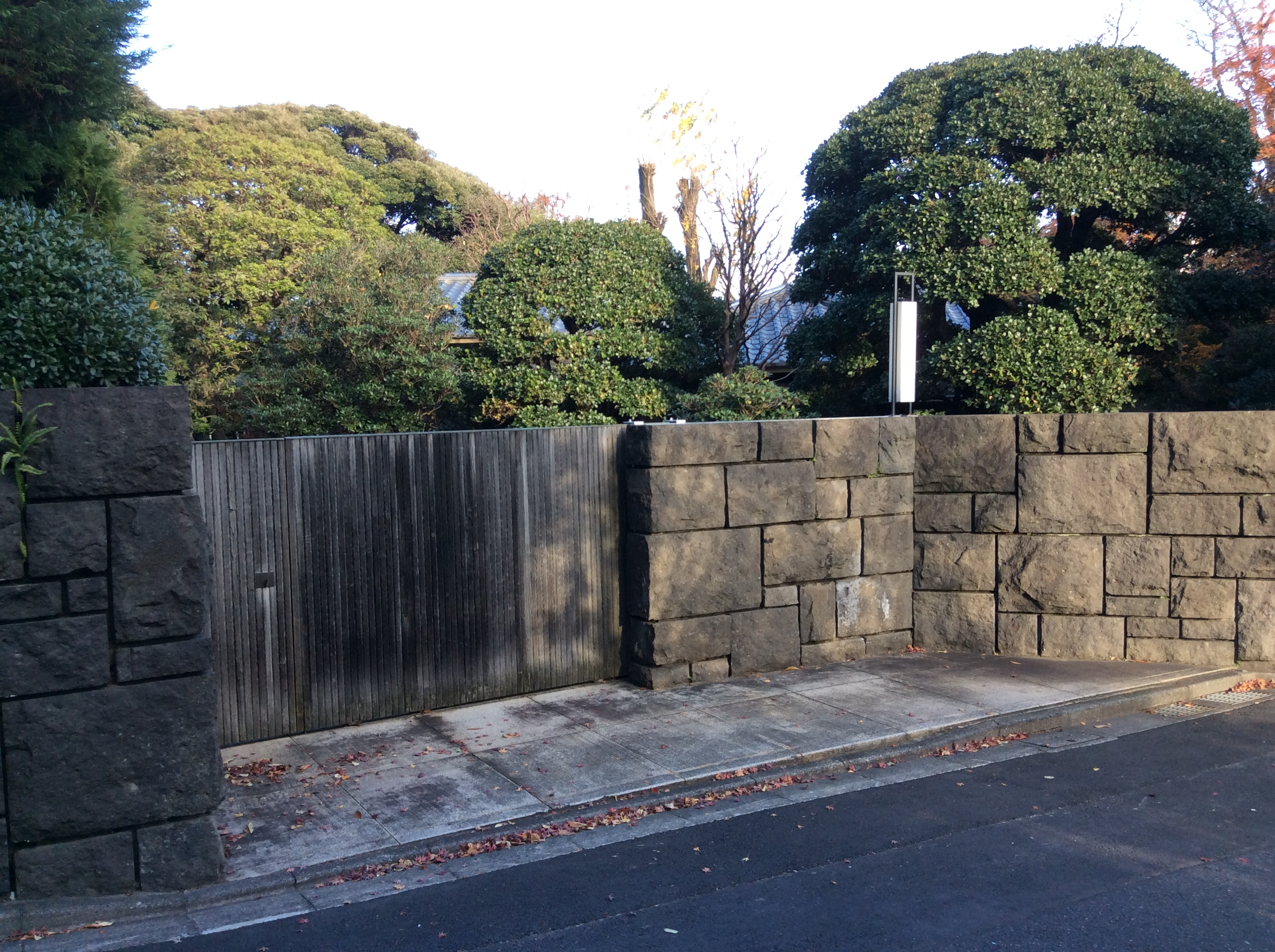 元麻布 菊池家住宅